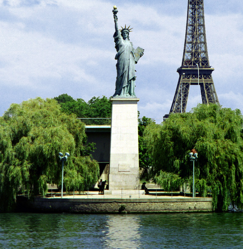 Statue de la Liberté sur l'île aux Cygnes en dessous du pont de Grenelle, Paris, XVe.